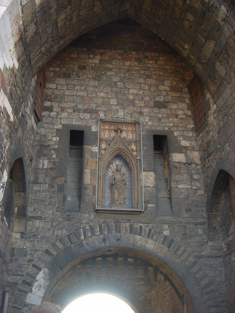 Aachen, Detail am Ponttor, Maria als Schutzheilige der Stadt